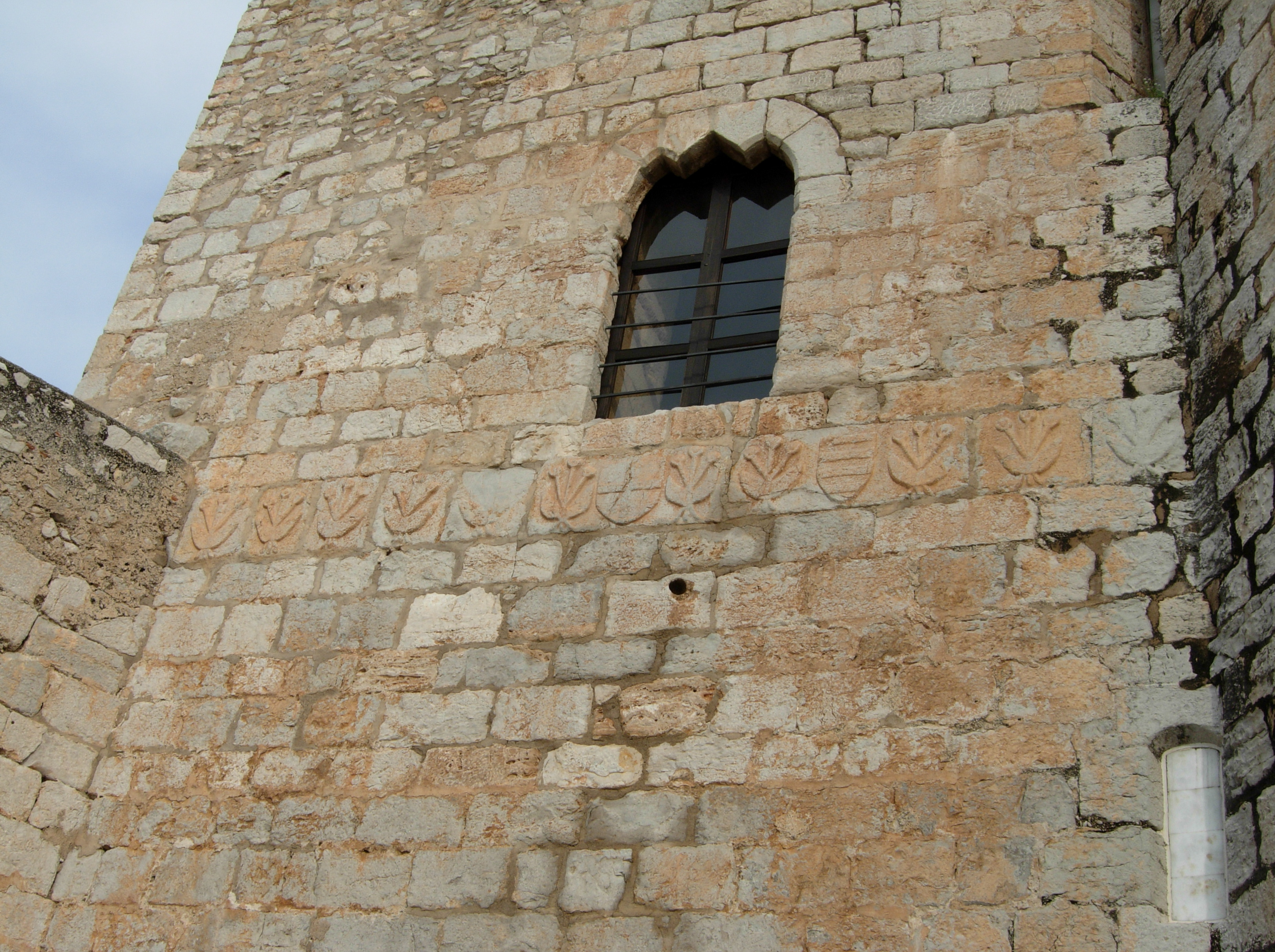 Peníscola - fris amb els escurs del Temple, de Berenguer de Cardona i d'Arnau de Banyuls.